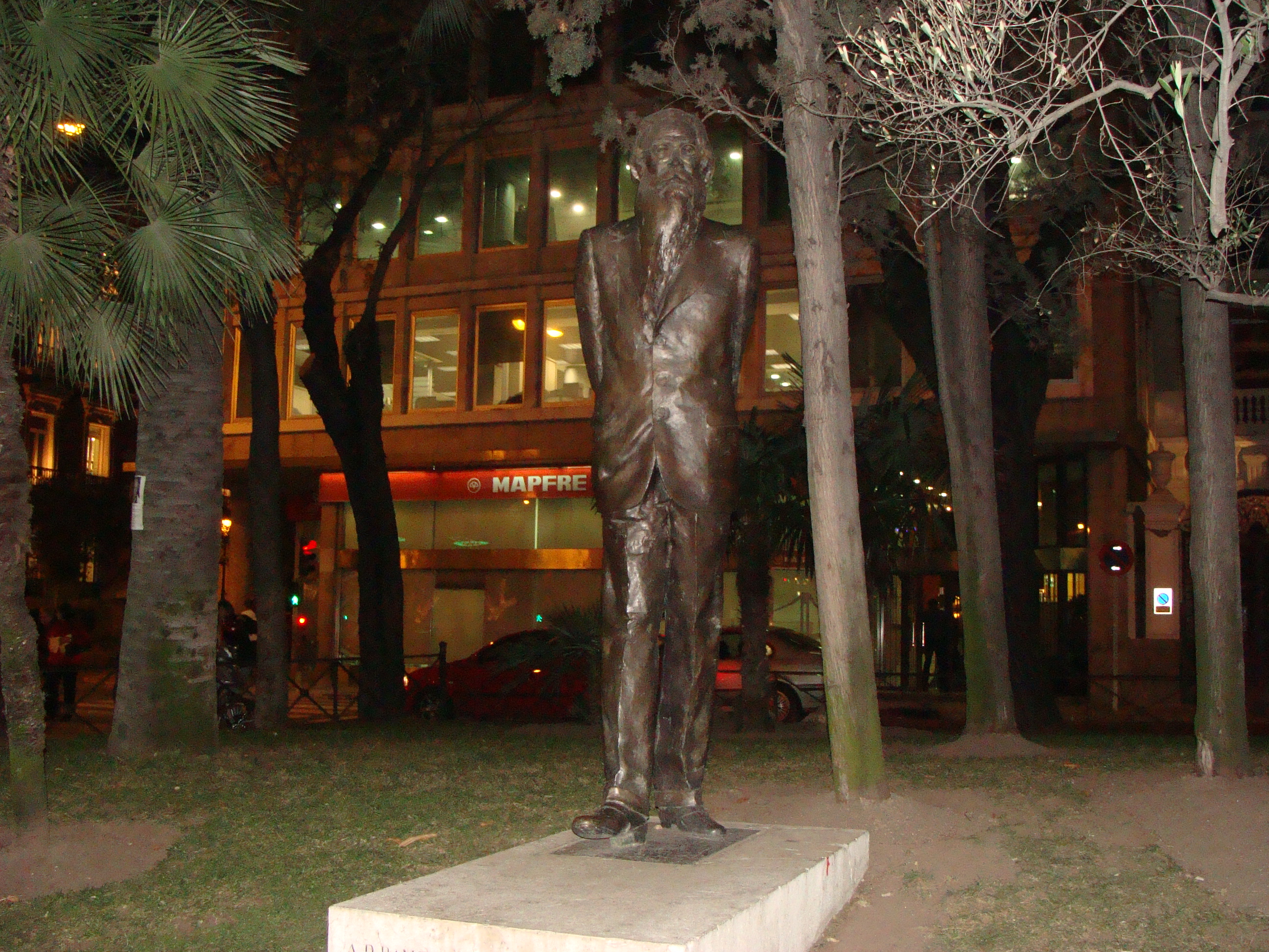 Άγαλμα του Ραμόν ντελ Βάλιε-Ινκλάν στη Μαδρίτη